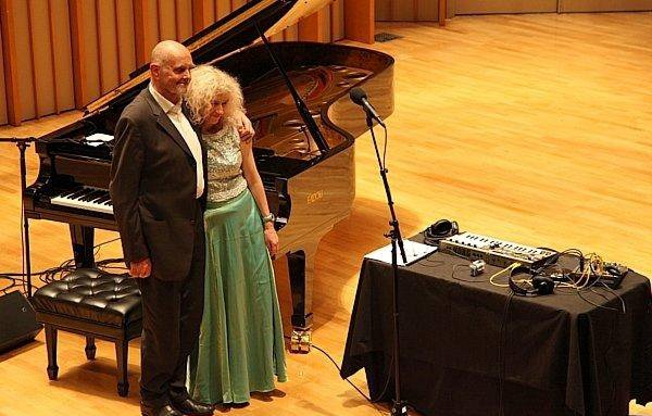 Alessandra Celletti con Joachim Roedelius in un concerto a Los Angeles